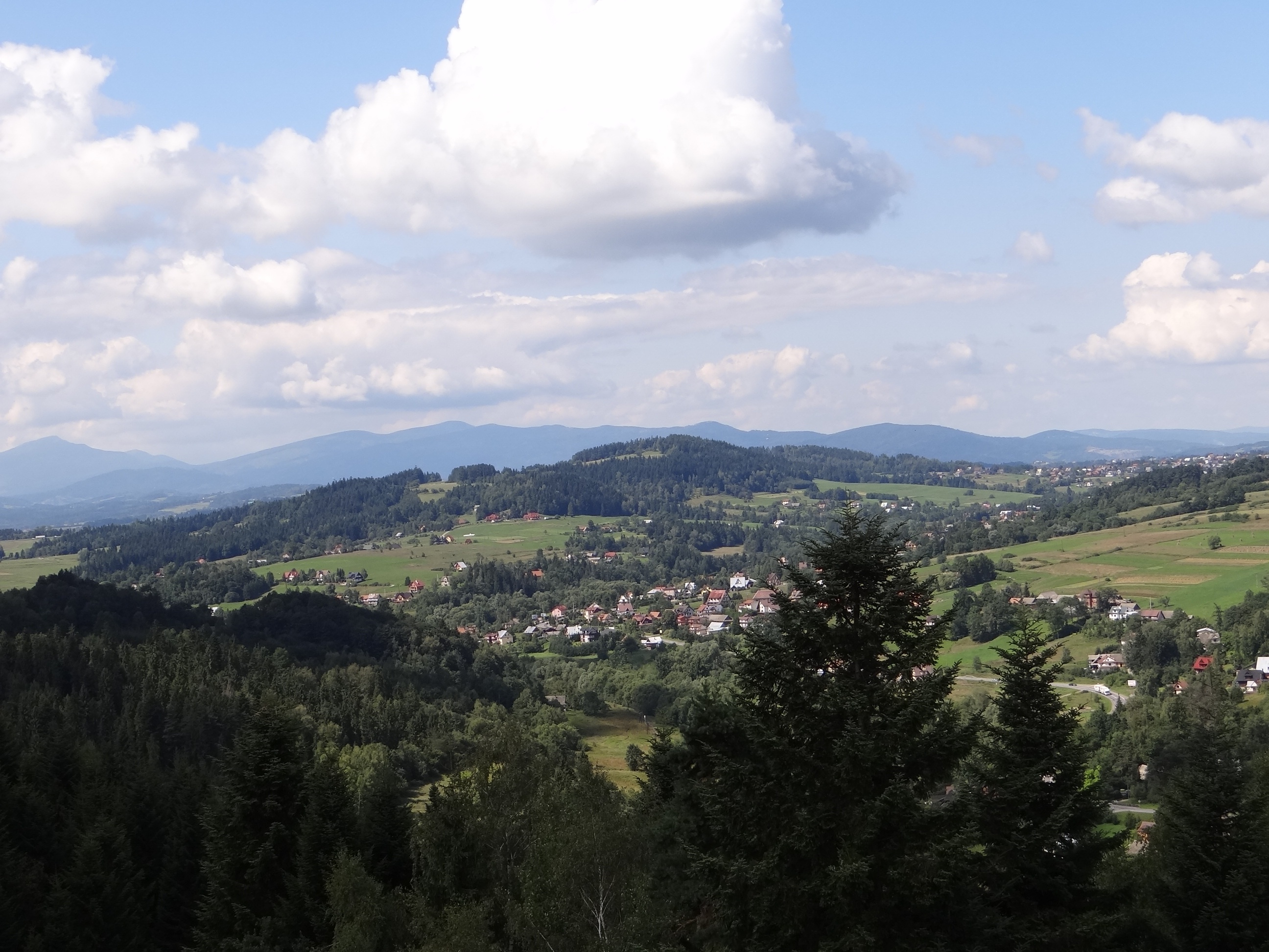 Widok z okolic Polczakówki